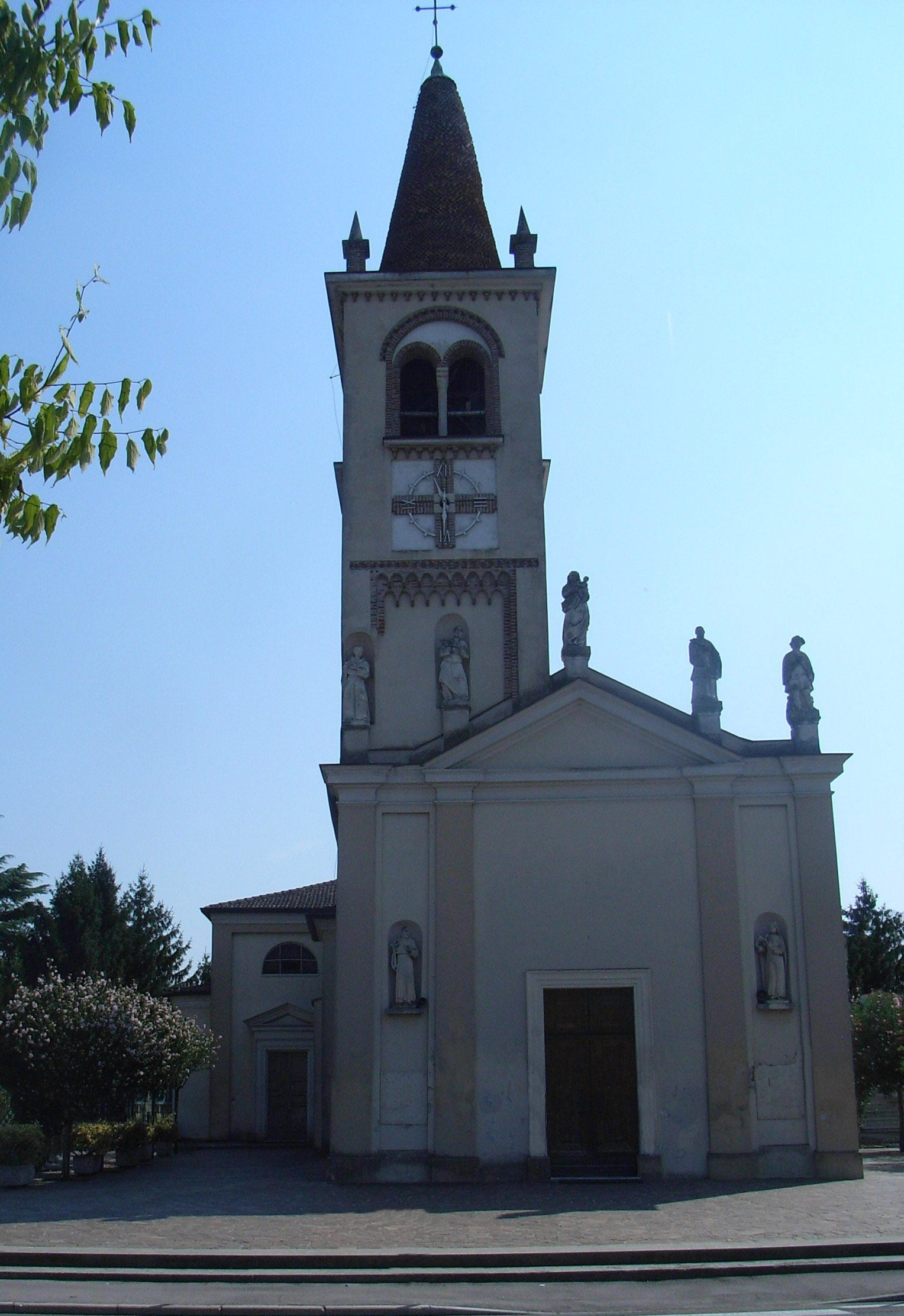 Santa Maria (Camisano Vicentino), Chiesa Parrochiale opera propria 21 agosto 2008 Lingtft